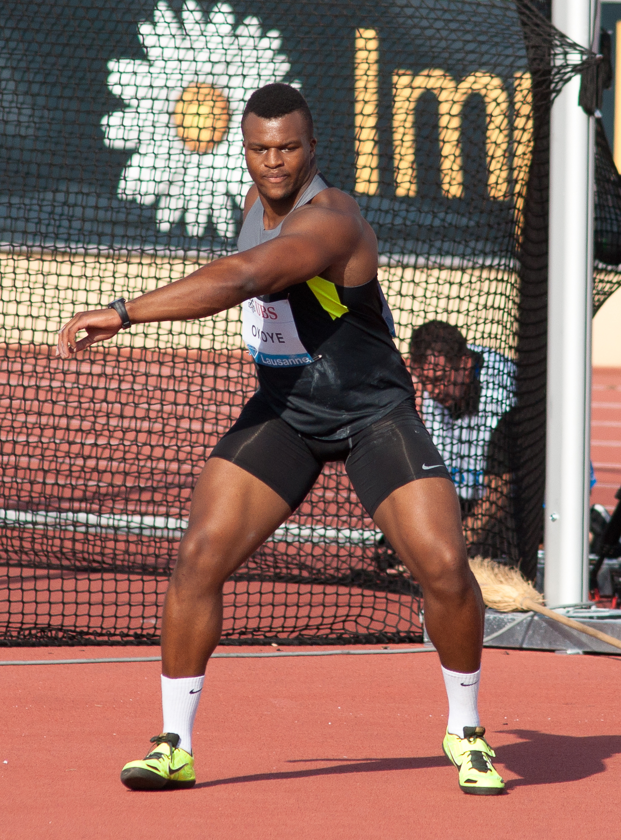 Athletissima 2012 - Lawrence Okoye